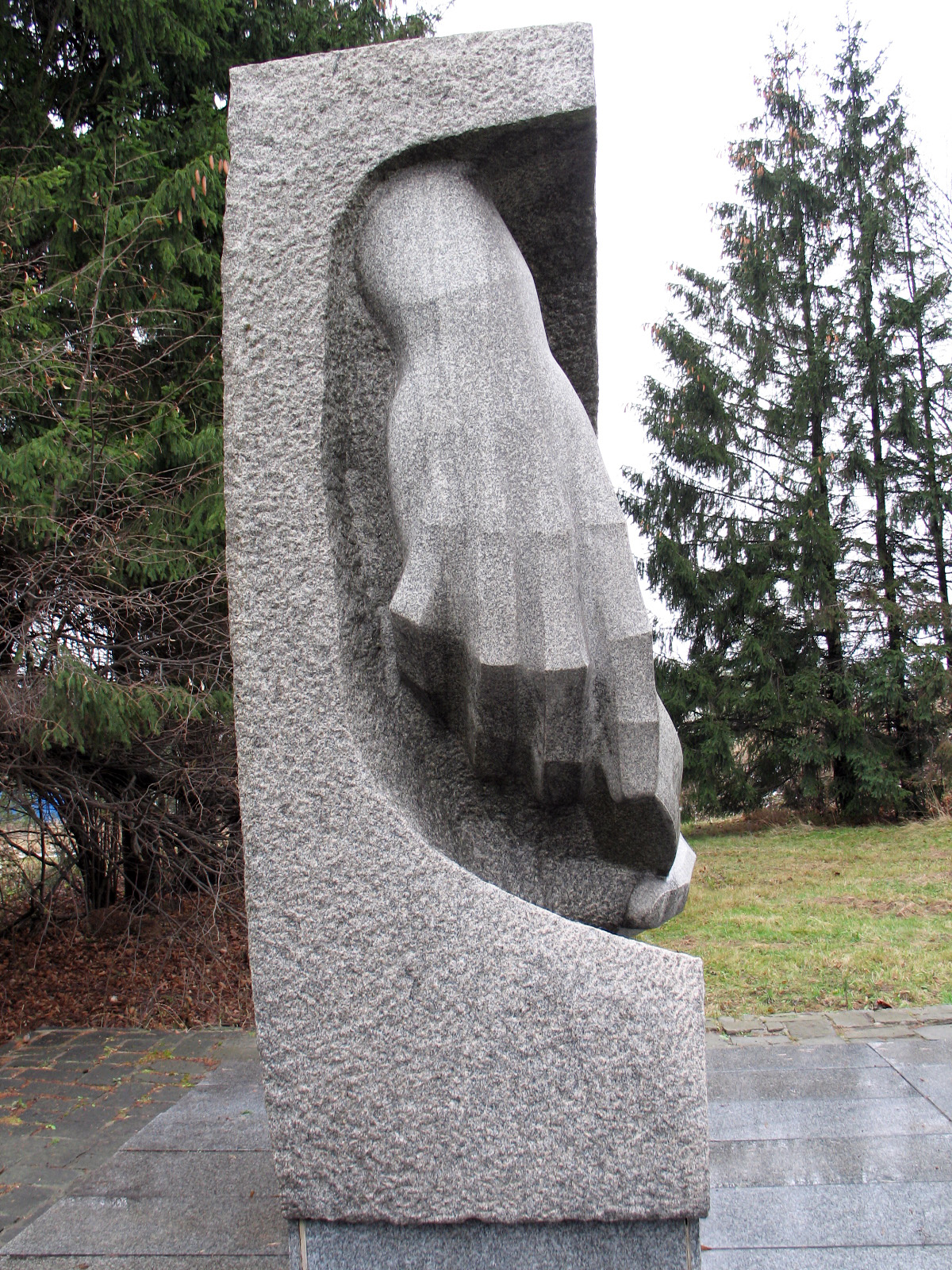 Realizátor 320 cm vysokého žulového pomníku ženijného vojska na Dukle bol akademický sochár Vojtech Löffler podľa ideového návrhu akademického sochára A. Račku.